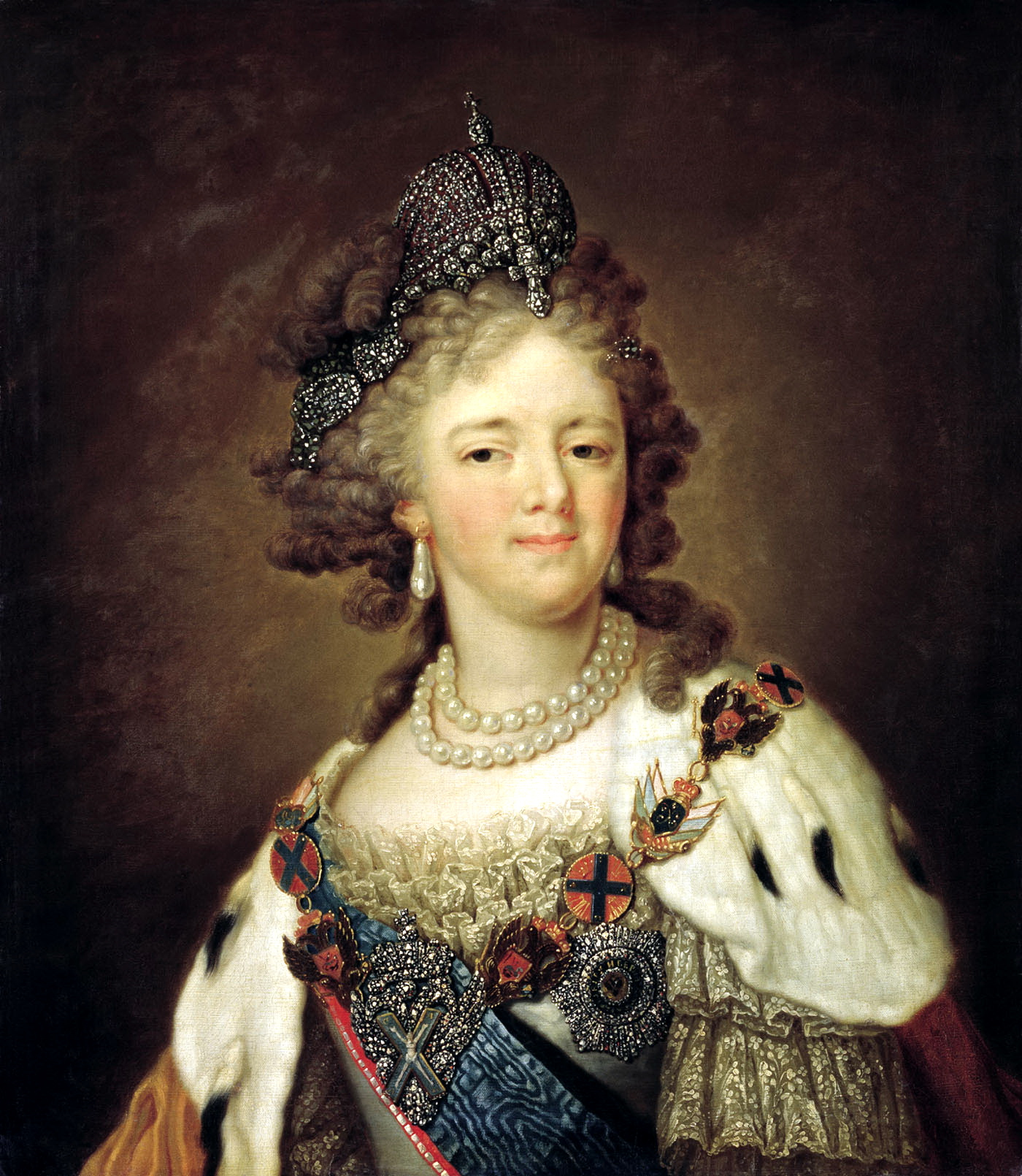 Портрет императрицы Марии Фёдоровны. Астраханская государственная картинная галерея имени П.М.Догадина